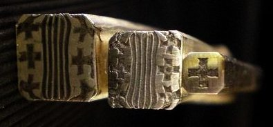 Mujodogane Kreuzdamast